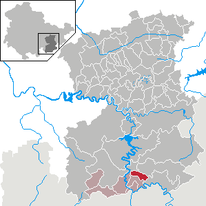 Birkenhügel in Thuringia - Saale-Orla-Kreis